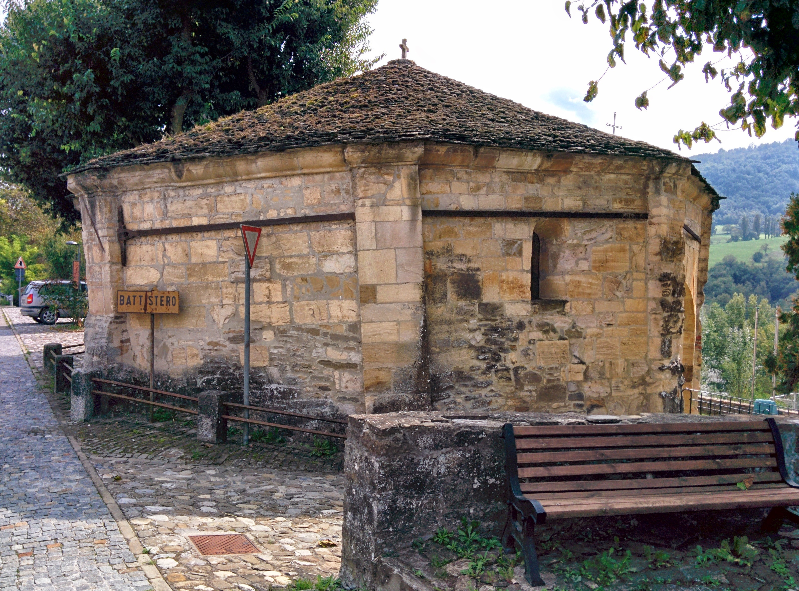 Battistero This is a photo of a monument which is part of cultural heritage of Italy.